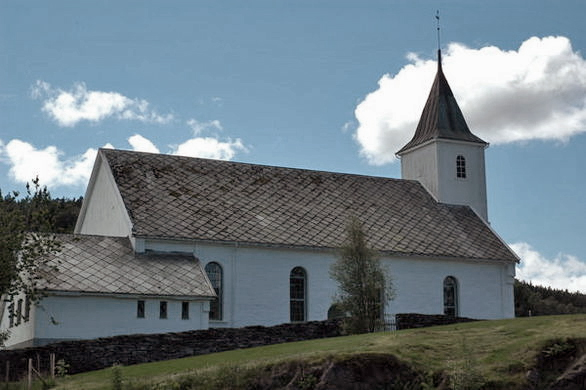 Myking kirke